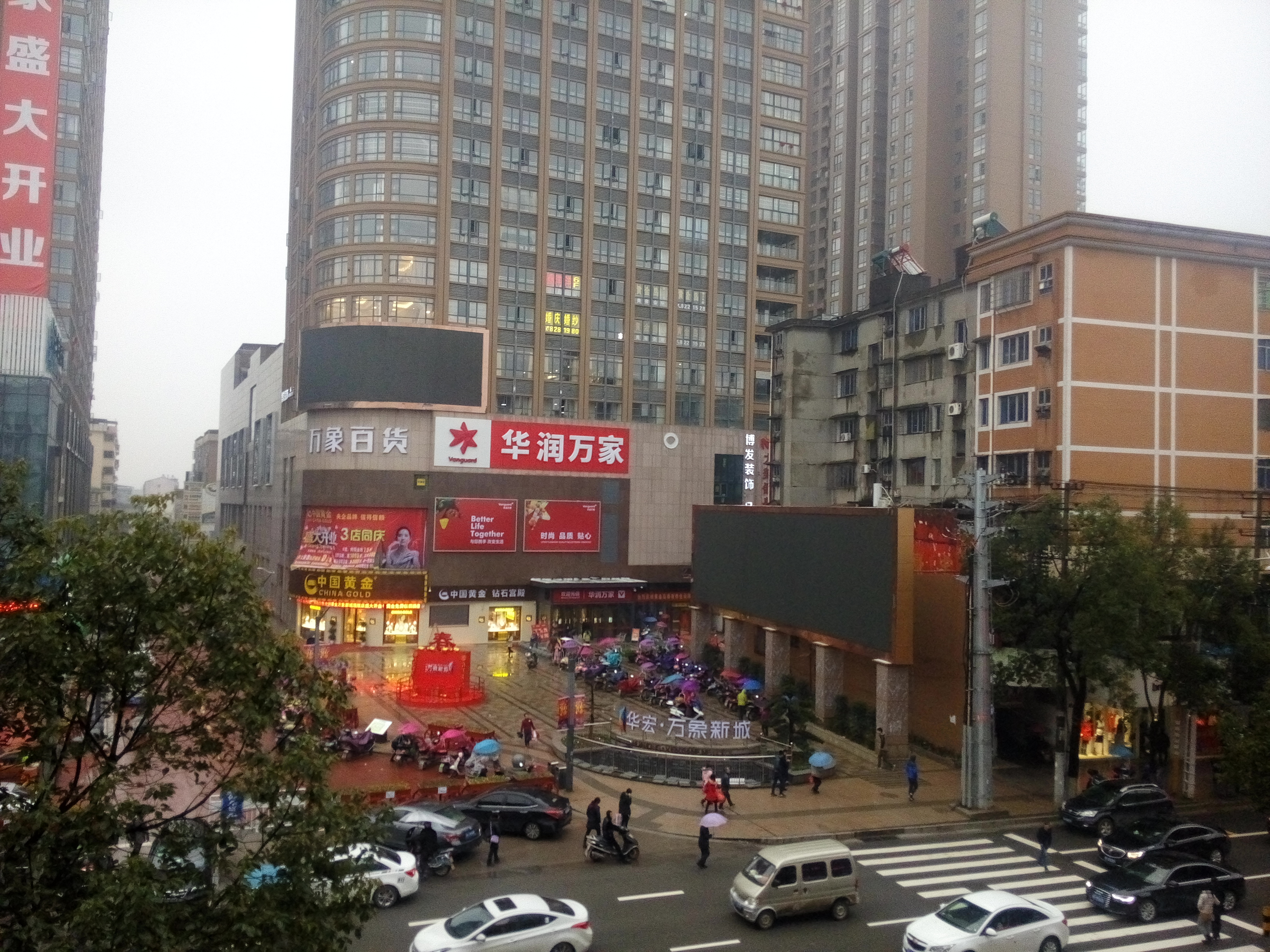 华润万家即将开业的赣东大道店